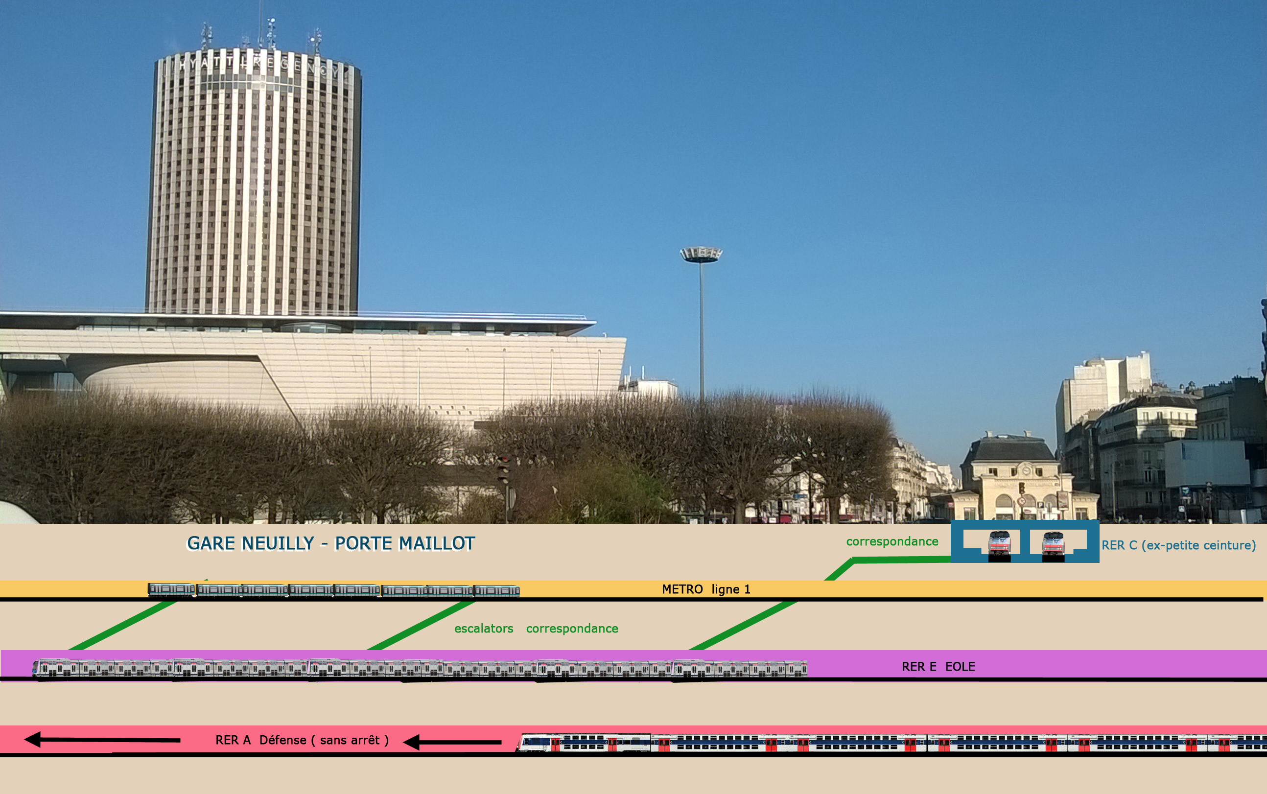 Projet d'extension de la gare de Neuilly - Porte Maillot. Vue longitudinale du projet de gare RER E ÉOLE et de correspondance avec ligne 1 du métro / RER C (ex-Petite Ceinture) et passage du RER A.